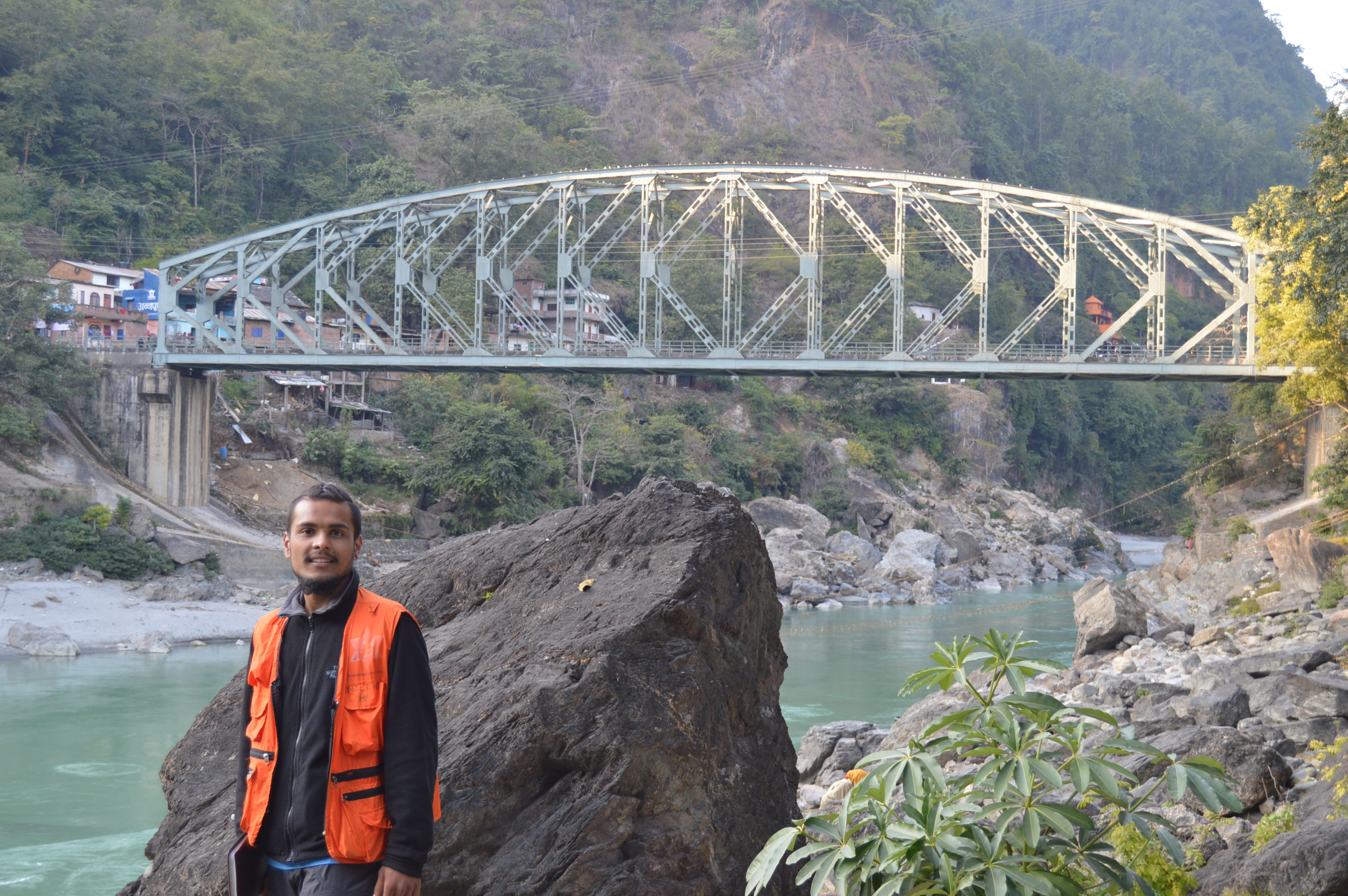 नेपाली: स्याङ्जा पाल्पा सिमानामा रहेको कालिगण्डकी पुल